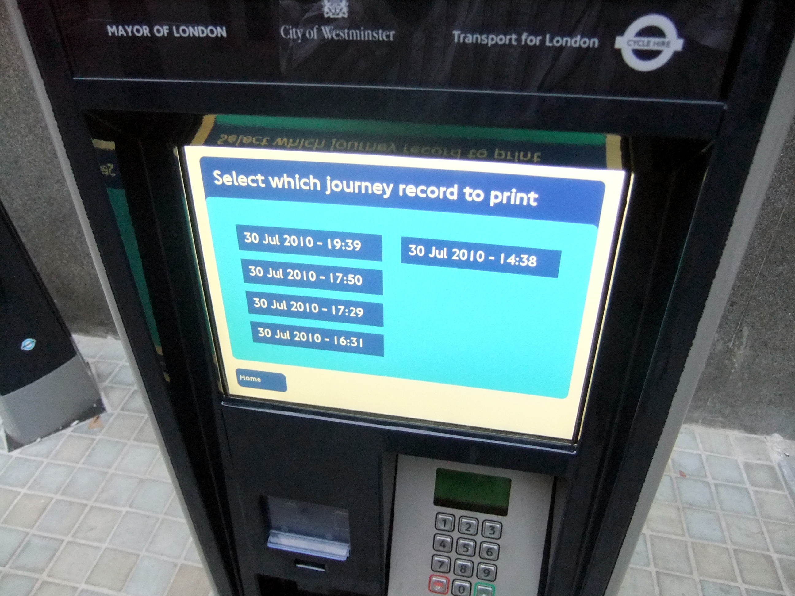 Print my journey details